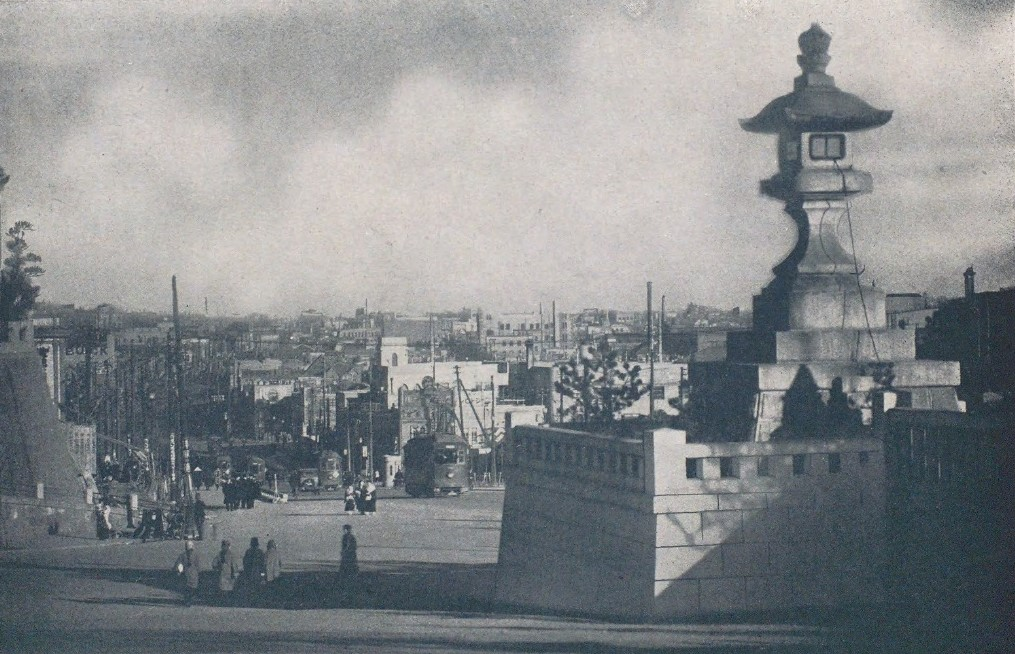 コンクリート舗装された九段坂。遠景にニコライ堂、手前に靖国神社の祭灯